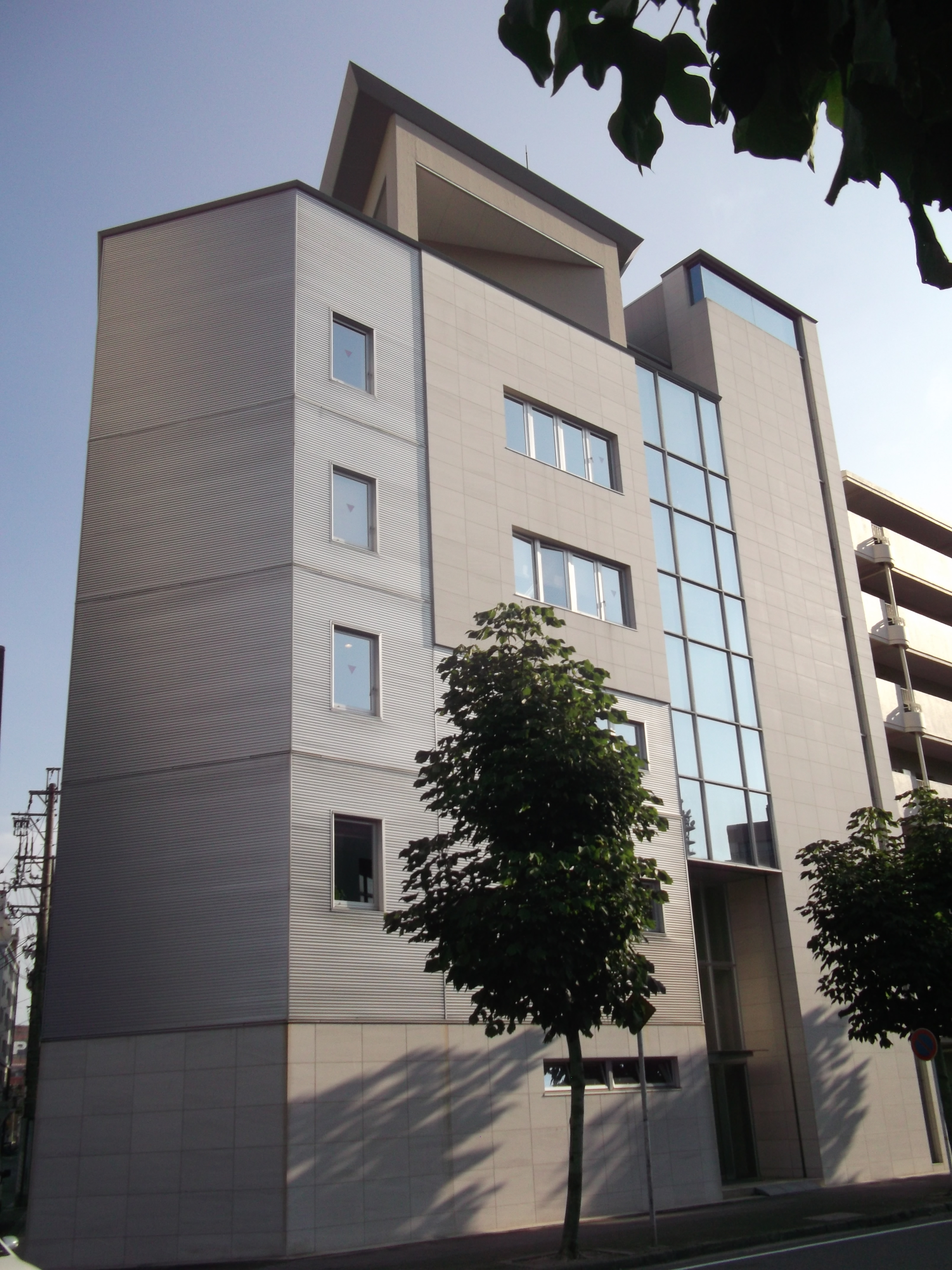 名古屋市東区のTIビルを北側公道東側より撮影